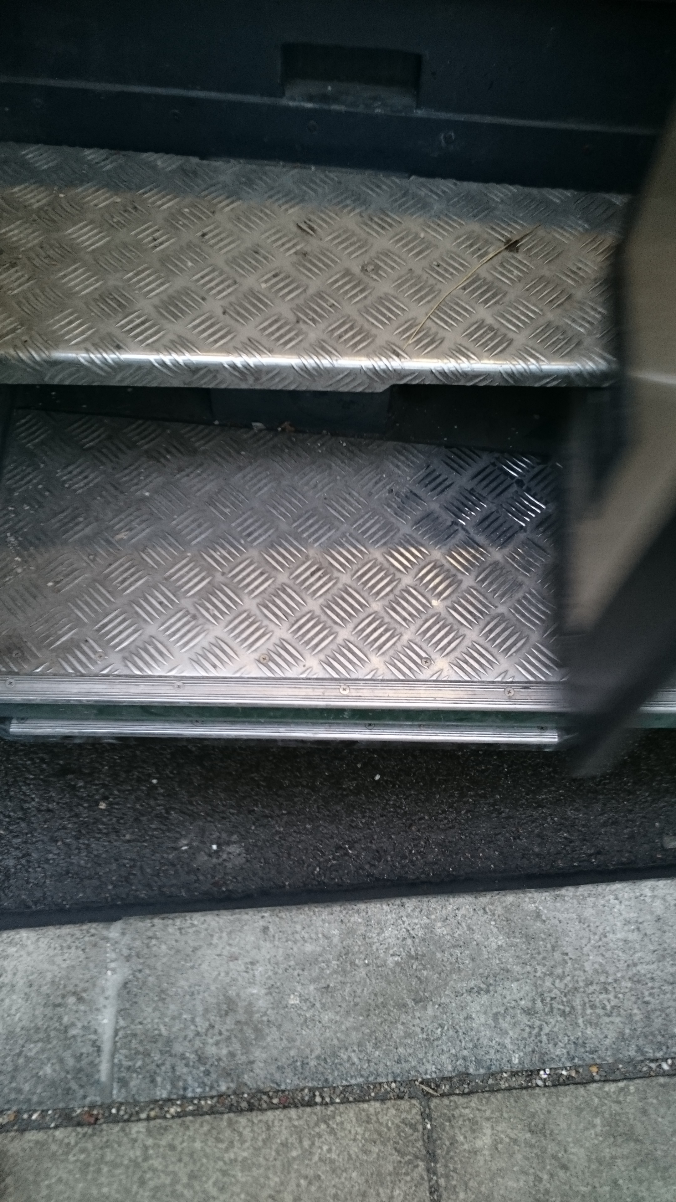 Blick auf M8C-Trittstufen am Königsplatz in Augsburg